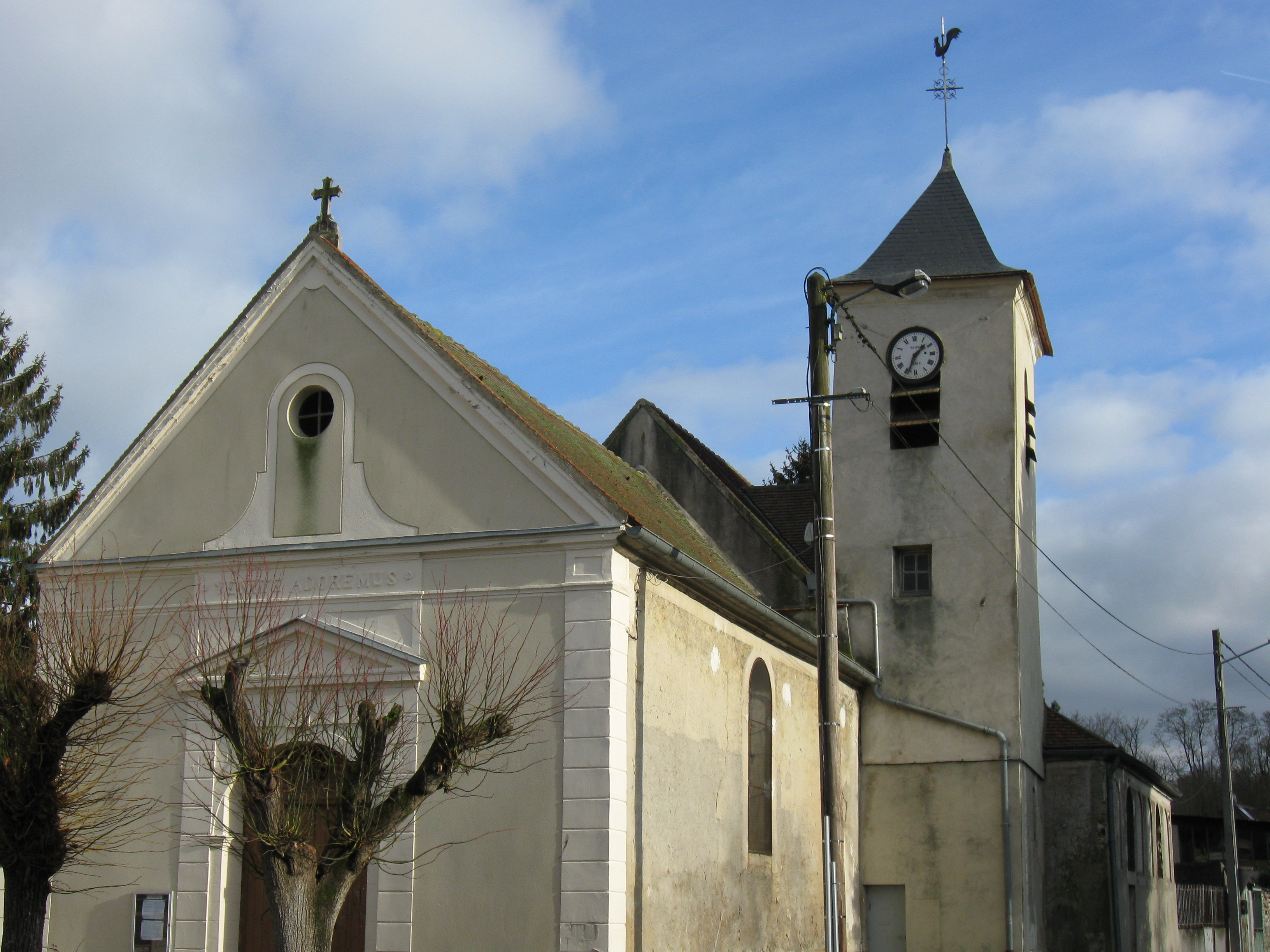 Église Notre-Dame de Lesches. (Seine-et-Marne, région Île-de-France).